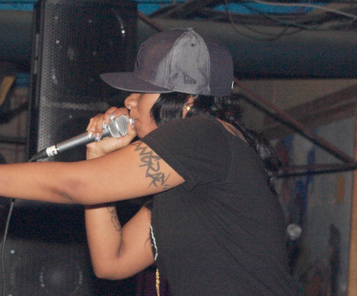 jean grae at la zona